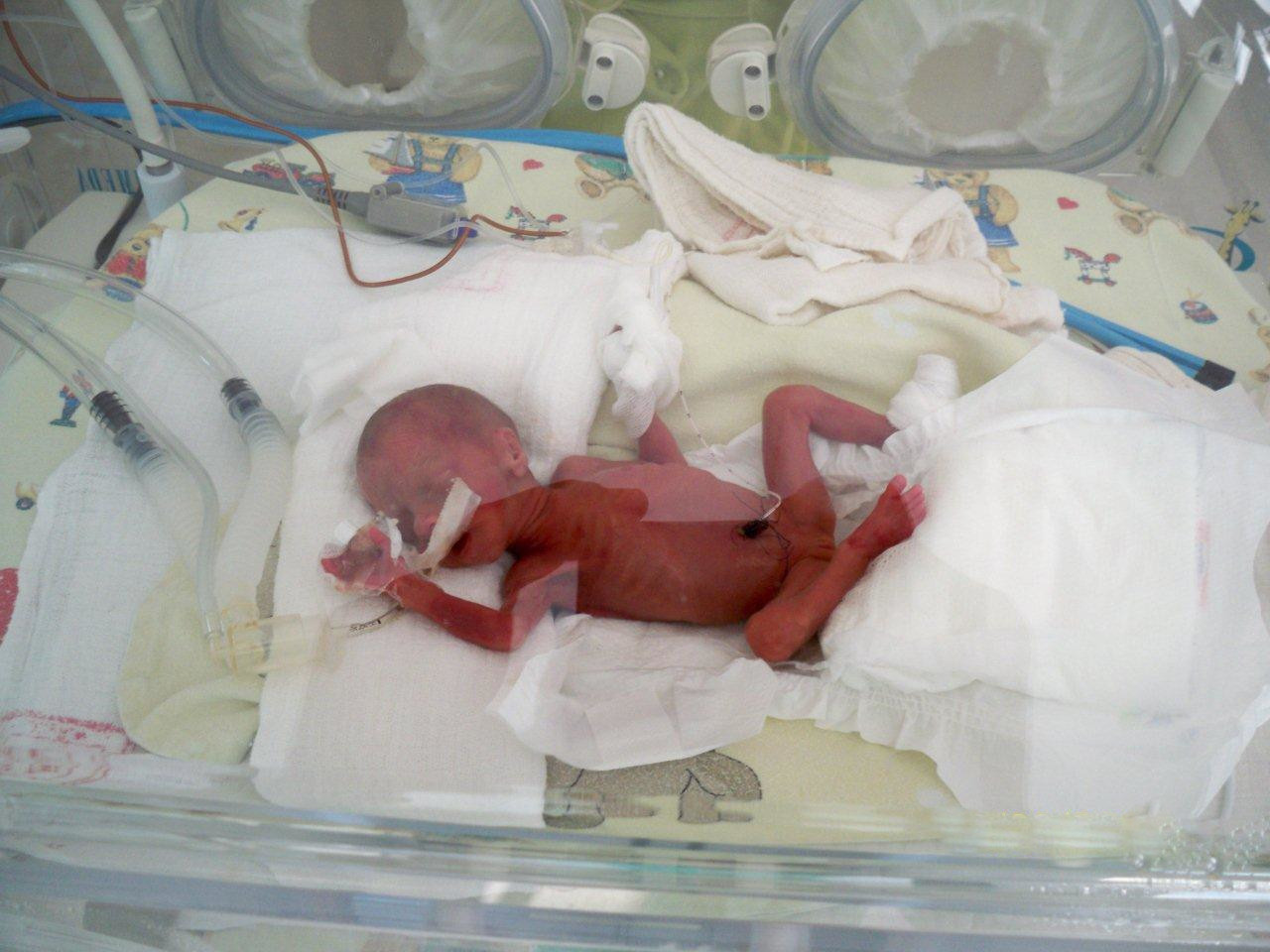 pierwszy tydzień po narodzinach waga 430 g